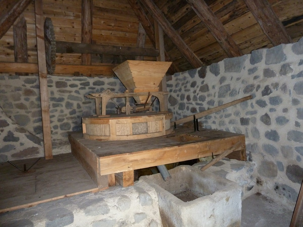 Moulin de Cézerat, communie de Vernole, Cantal, France